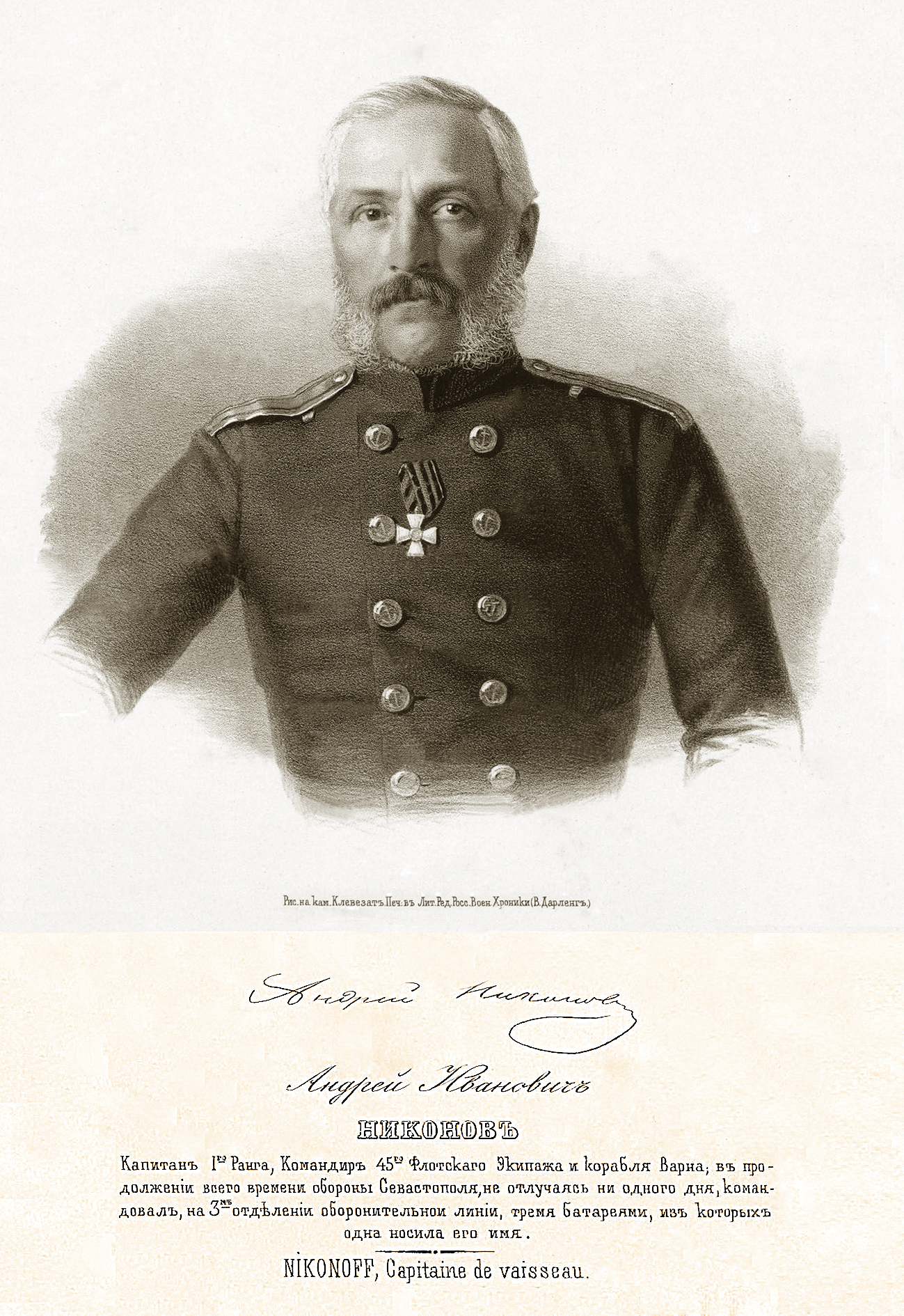 капитан 1-го ранга Андрей Иванович Никонов, кавалер ордена Св. Георгия IV ст.